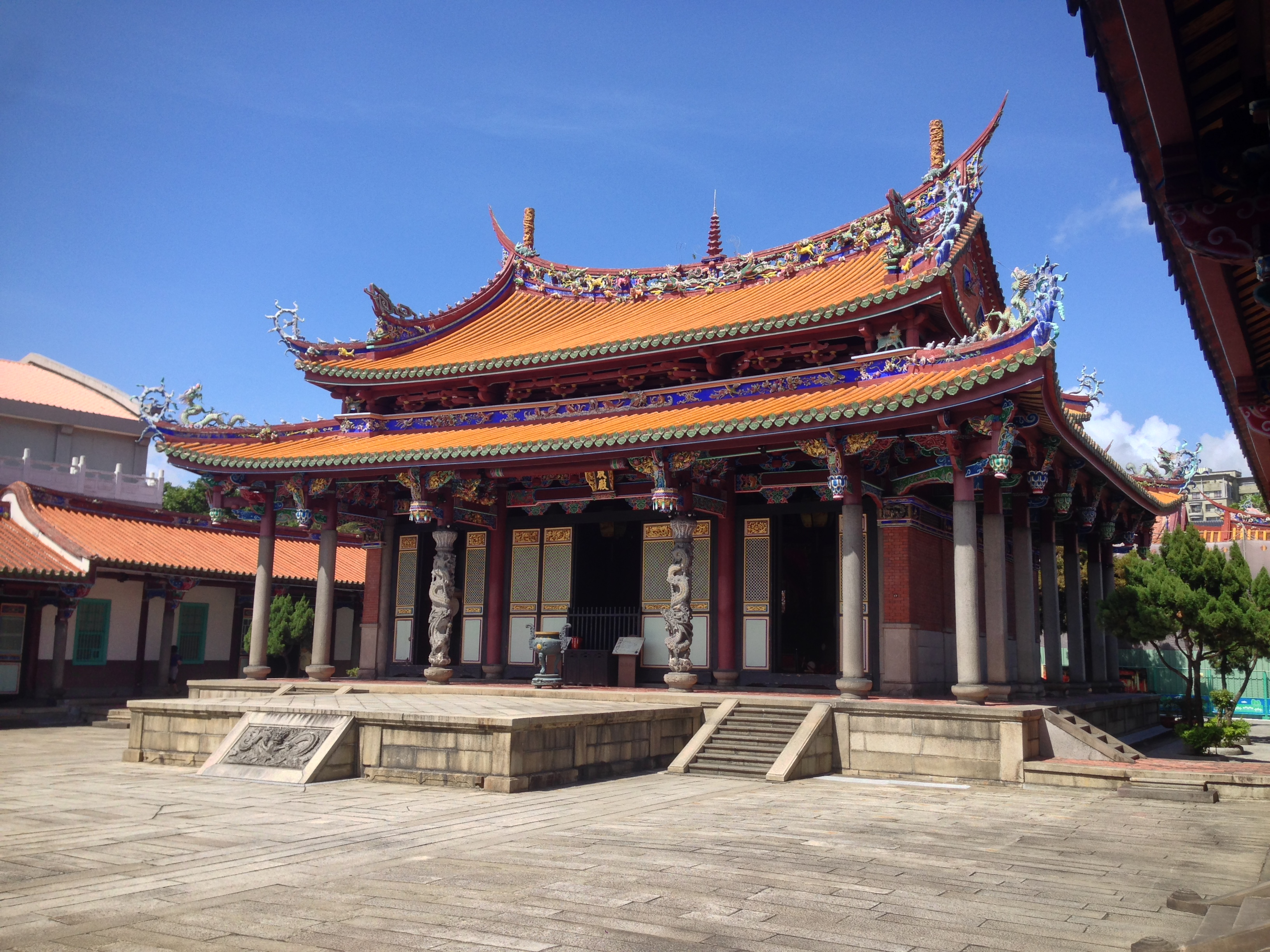 中文（台灣）: 台北孔子廟大成殿斜照